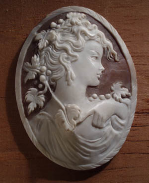 Cammeo su conchiglia raffigurante testa femminile allegoria dell'autunno